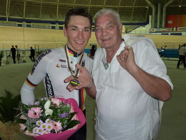 Lukas Liß (l.), deutscher Radrennfahrer, und sein Vater Lucjan Lis, ehemaliger polnischer Radrennfahrer